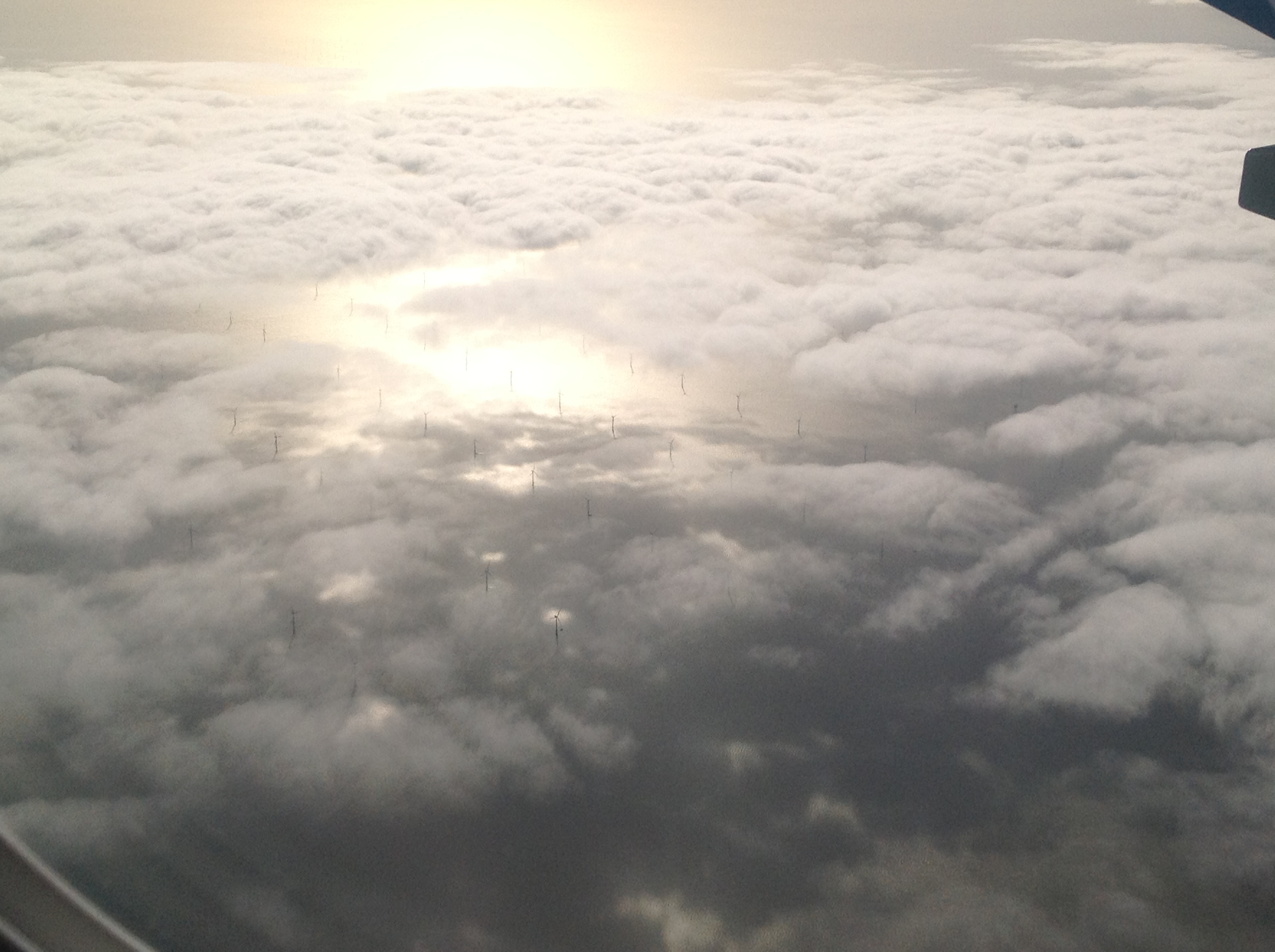 Windpark in der Nordsee. Vermutlich Greater Gabbard